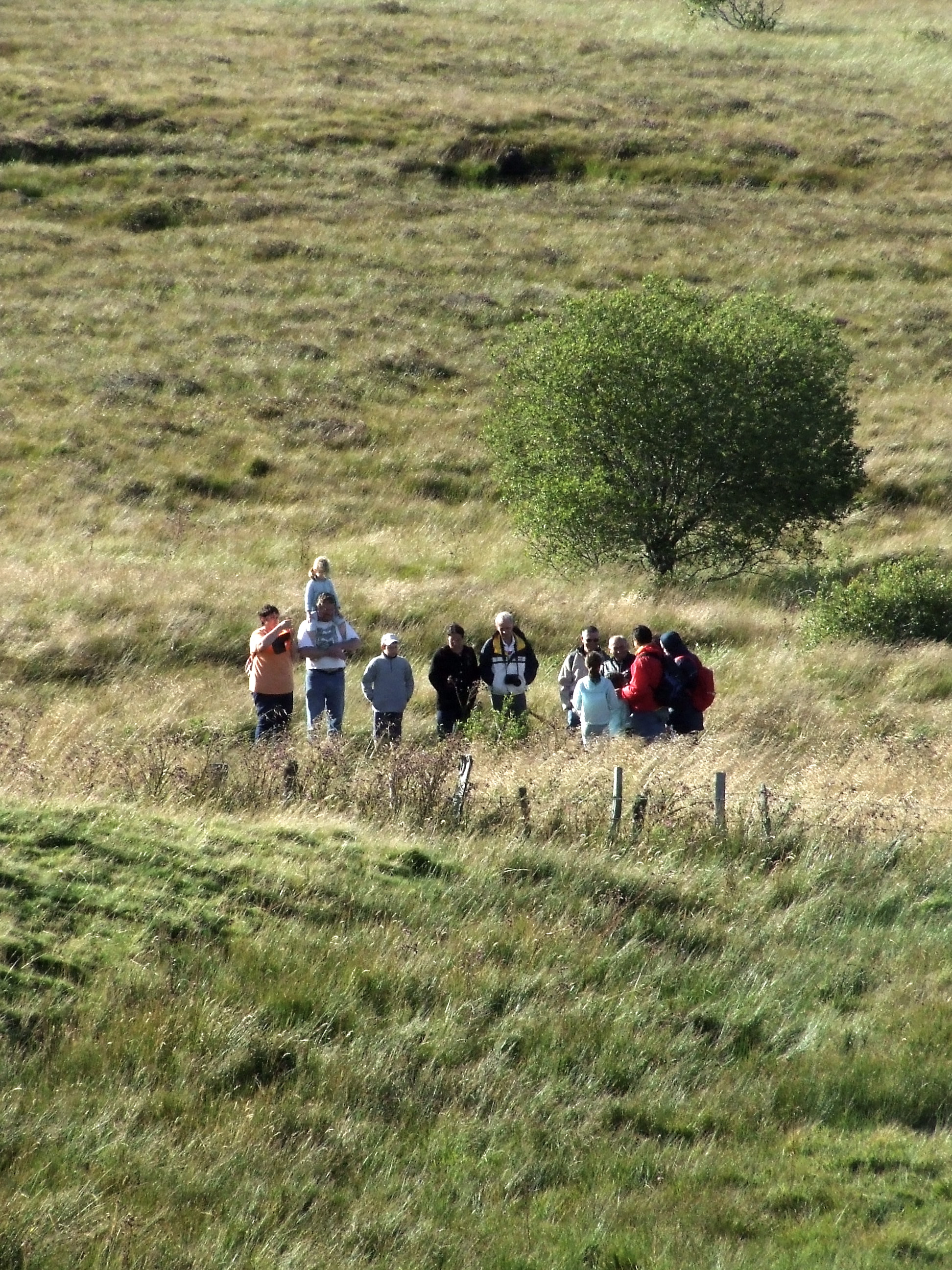 animation sur la tourbière aménagée par ponton de la Plaine Jacquot, par les animateurs de la Maison des Tourbières.